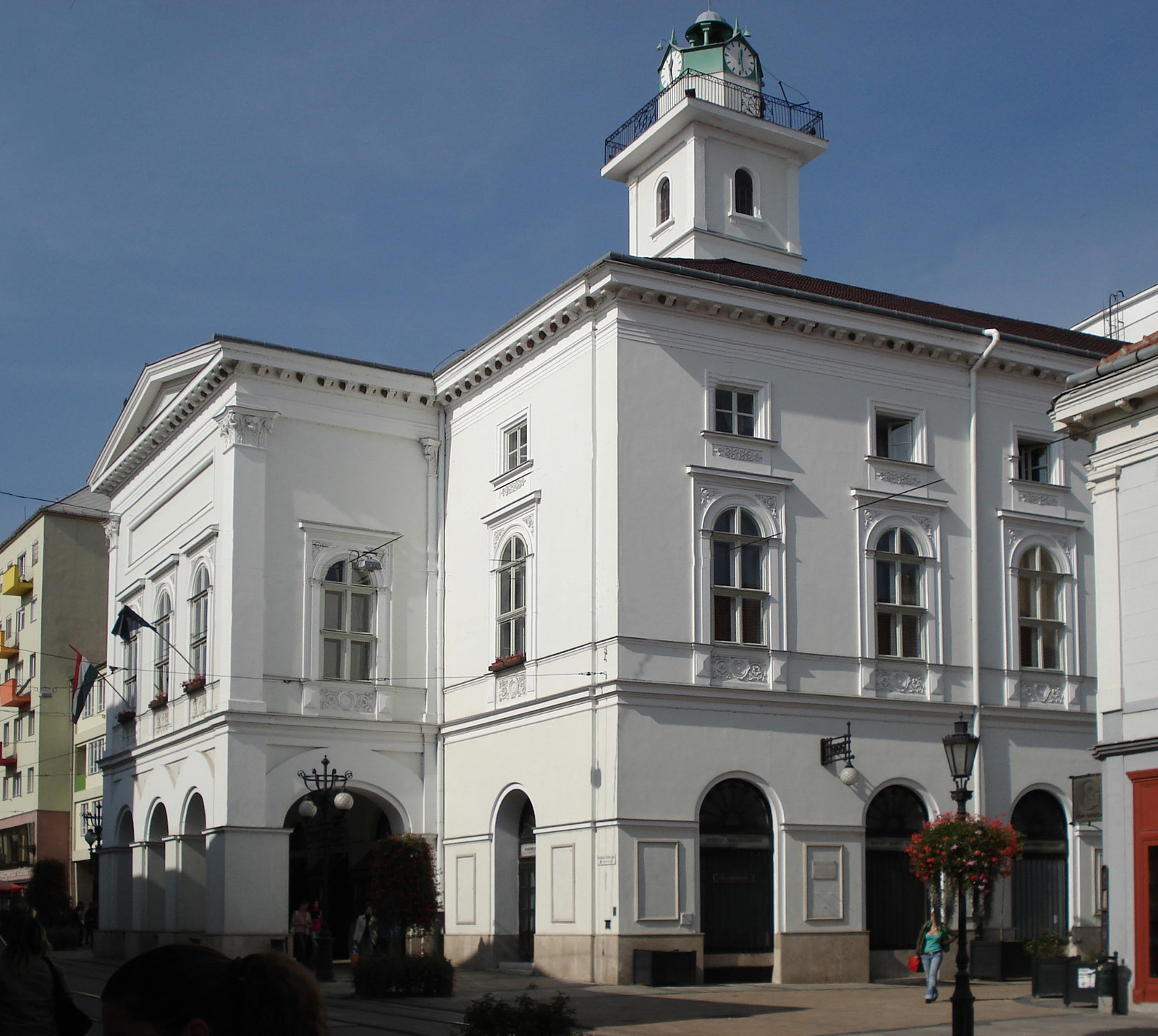 Nemzeti Színház (Miskolc, Déryné utca 5.) This is a photo of a monument in Hungary. Identifier: 2937